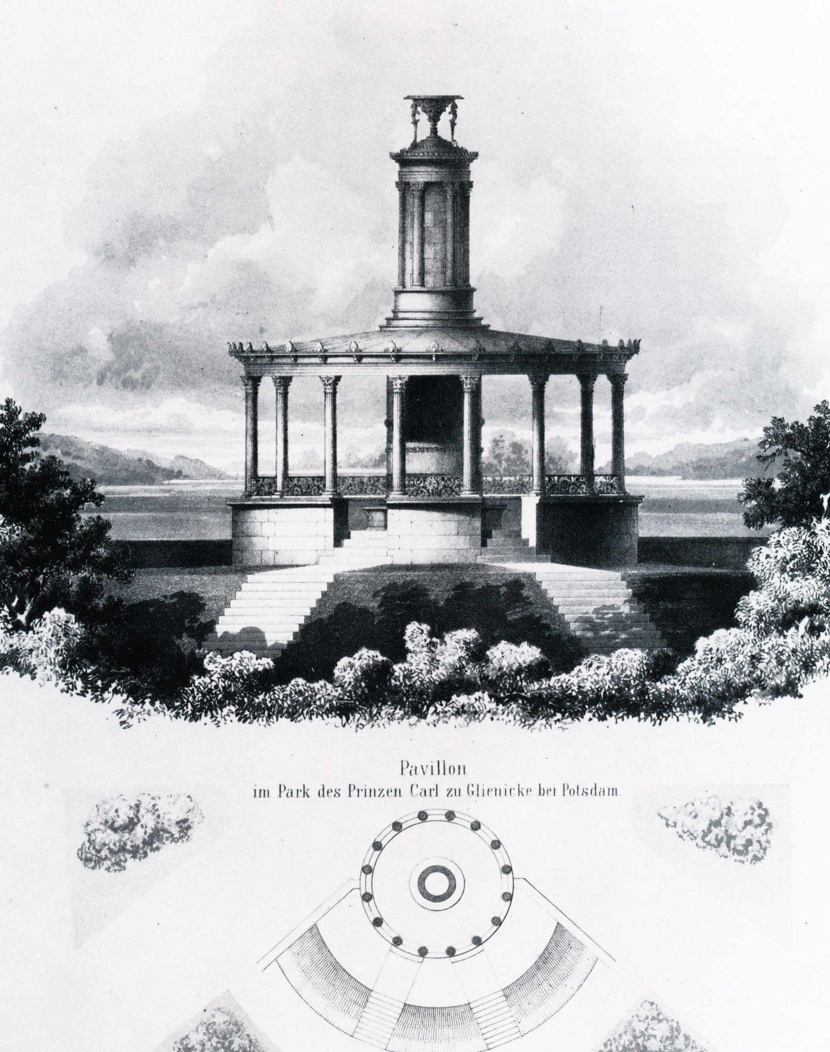 Gartenseite der Rotunde im Park von Klein-Glienicke, Lithografie von Persius, um 1840, Architektonisches Skizzenbuch, XL, 3,Bl.5